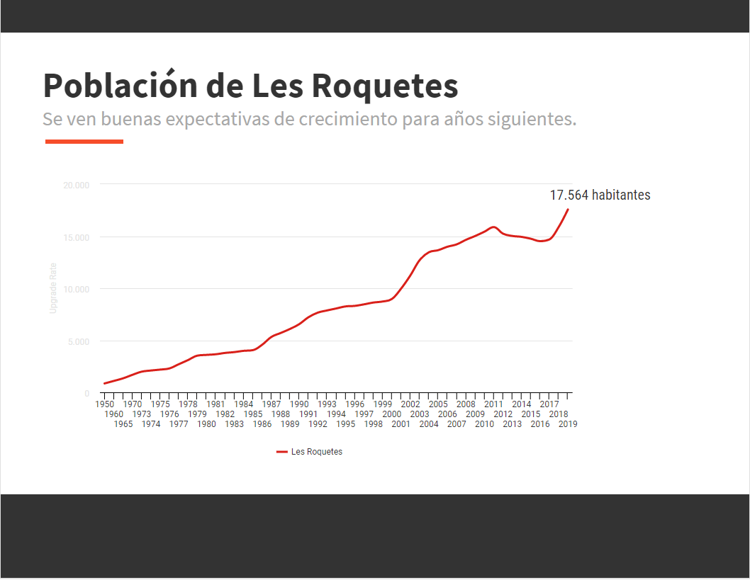 Gráfico de la Población del barrio de Les Roquetes, Barcelona